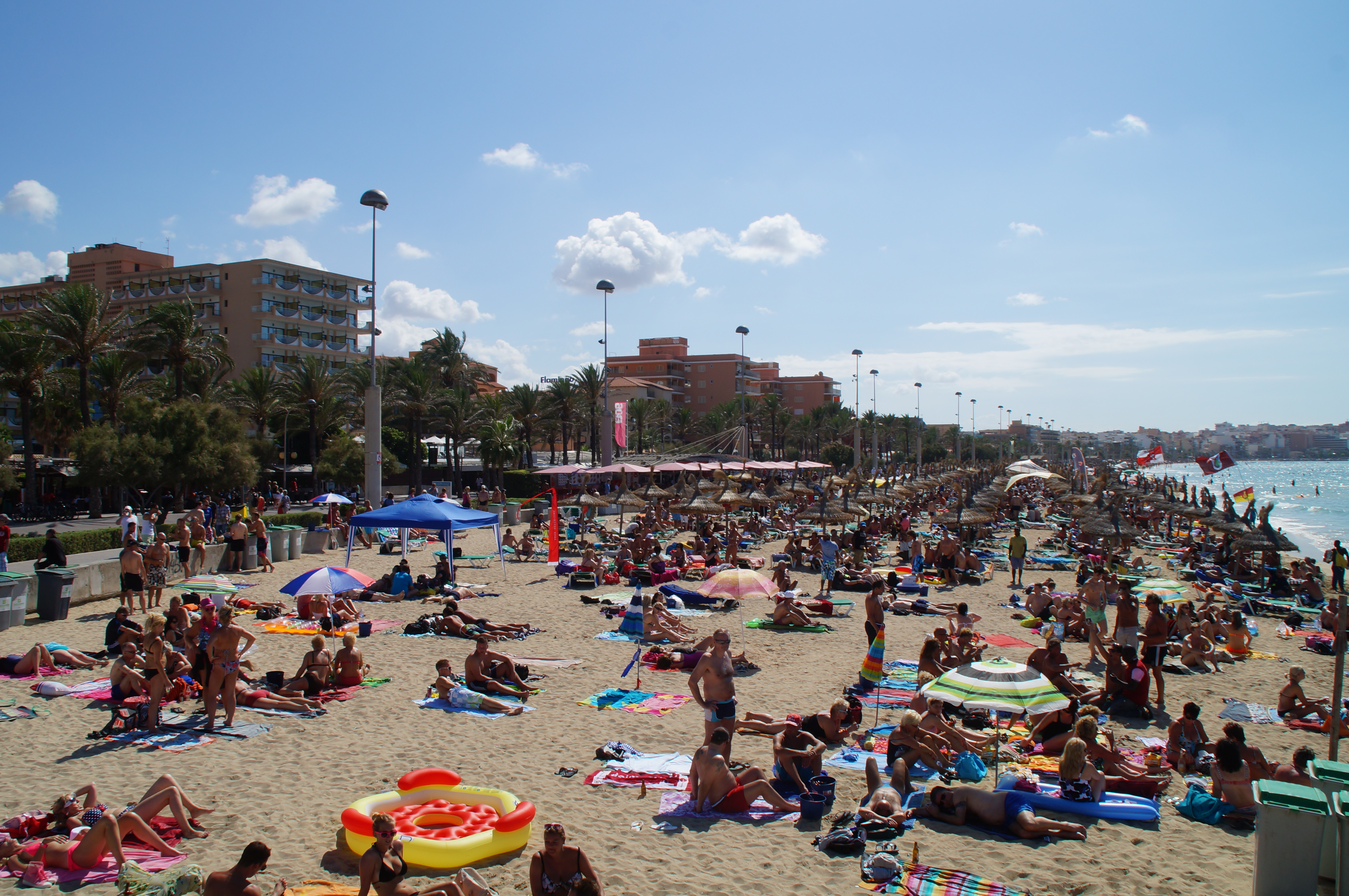 Der Strand des berühmten Ballermann 6 an der Playa de Palma auf Mallorca im September 2013 bei Sonnenschein.